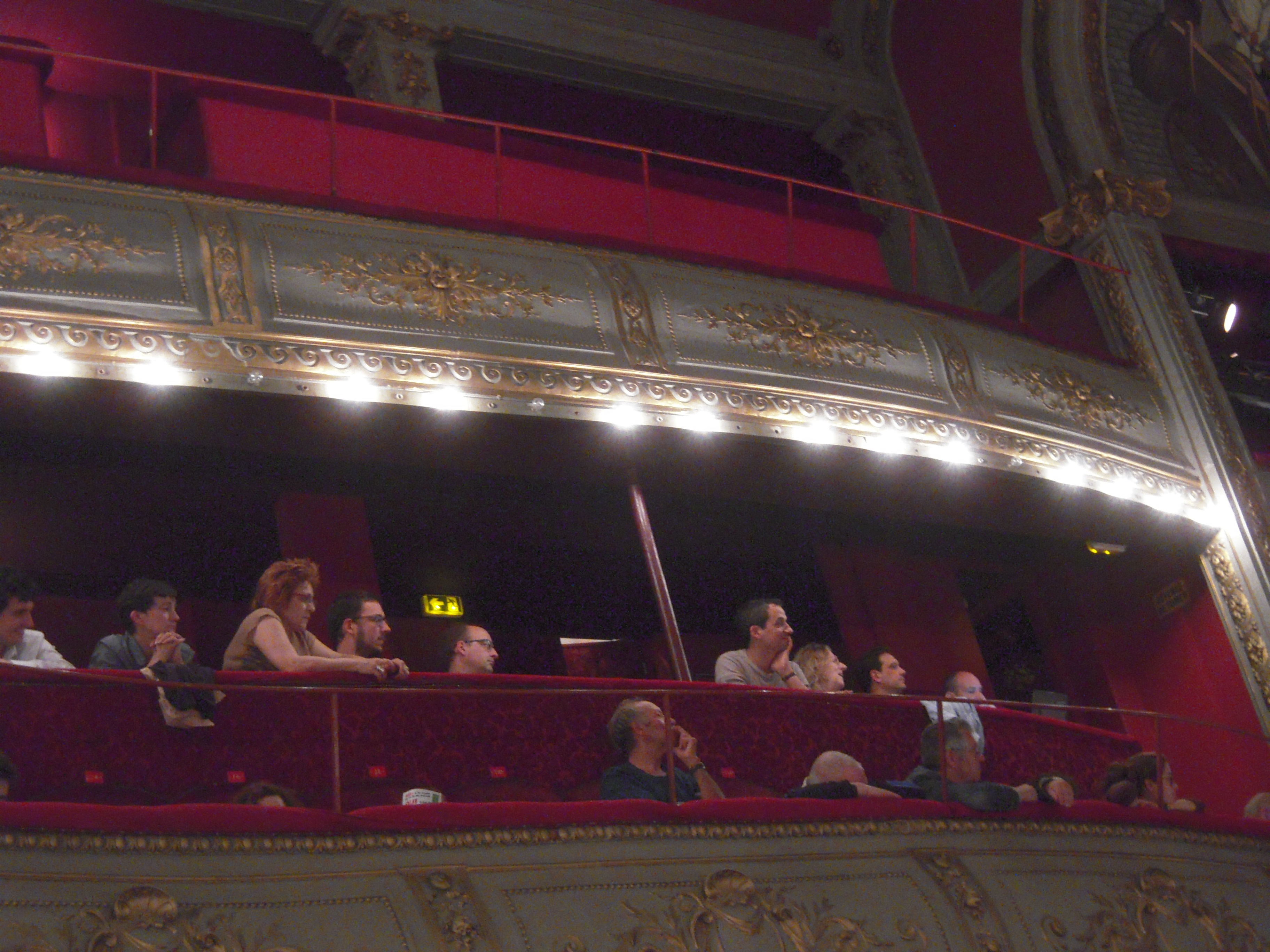 Dimanche, un "grand meeting unitaire" pour soutenir les grévistes a été organisé au théâtre Déjazet, à Paris. Un rassemblement sous les dorures, auquel ont répondu présent une quinzaine d'orateurs allant de la gauche contestataire (Clémentine Autain du Front de gauche, Marie-Pierre Vieu du PCF en remplacement de Pierre Laurent, en passant par le frondeur du PS Gérard Filoche) aux militants syndicaux et associatifs.